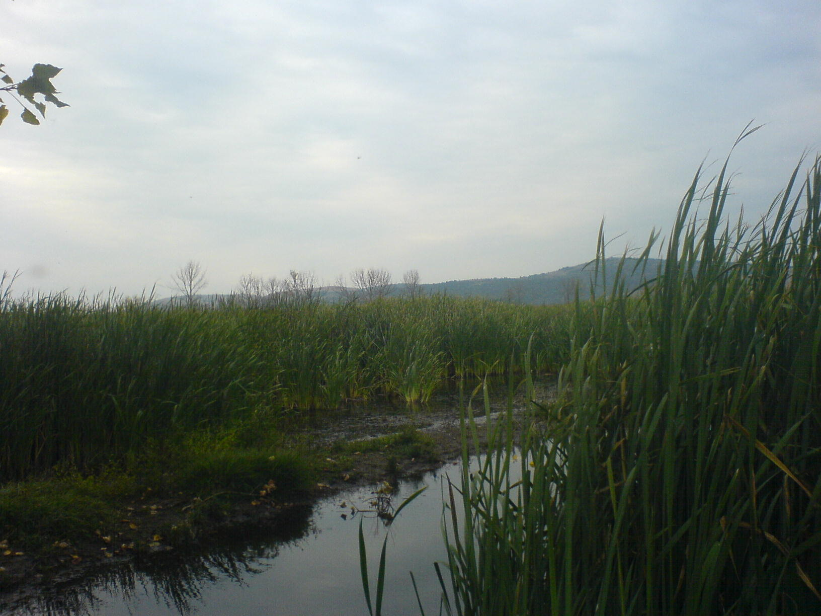 Драгоманско блато 2006